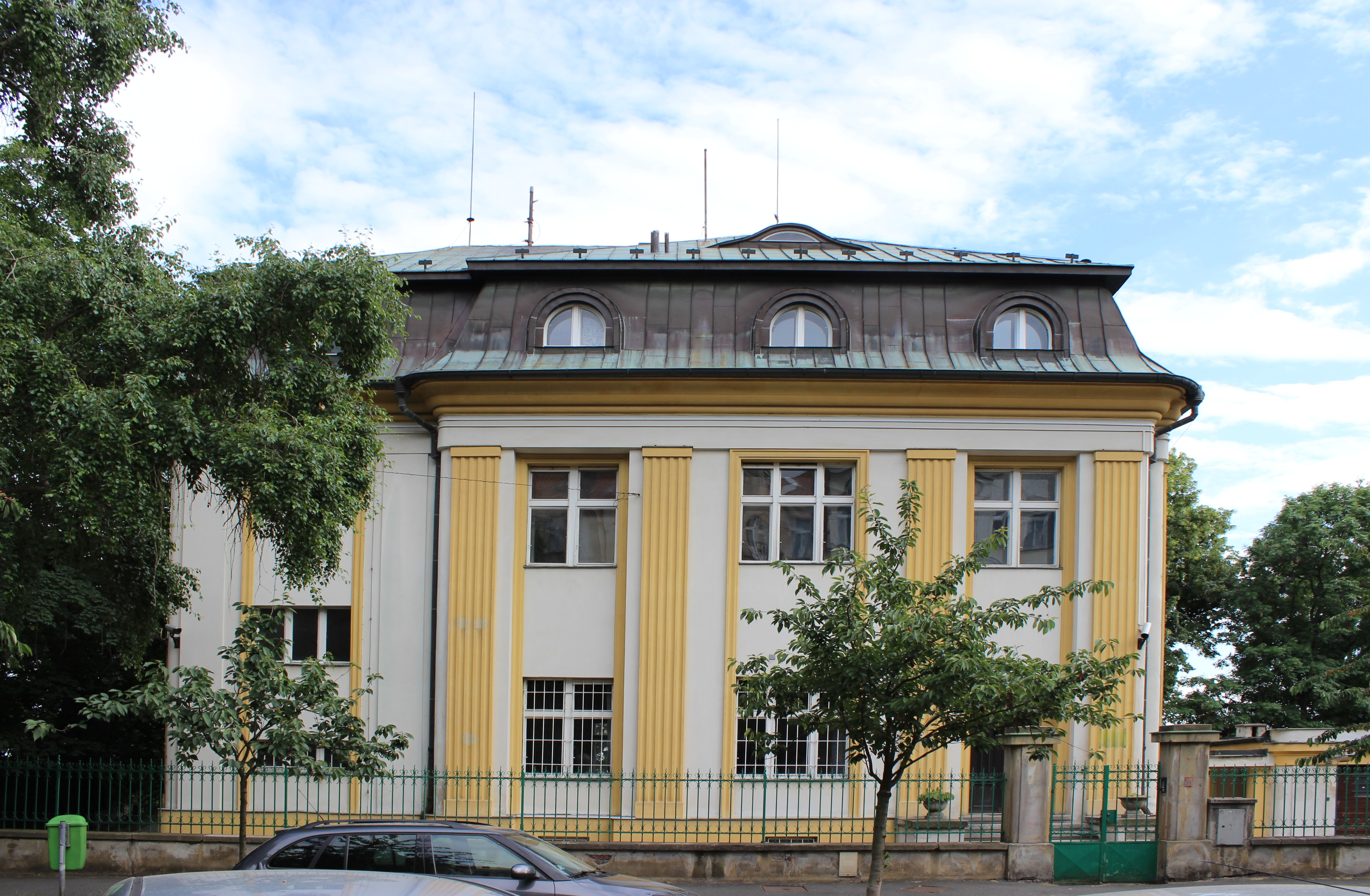 Dům v Dykově ulici, kde vzniklo divadlo Járy Cimrmana.